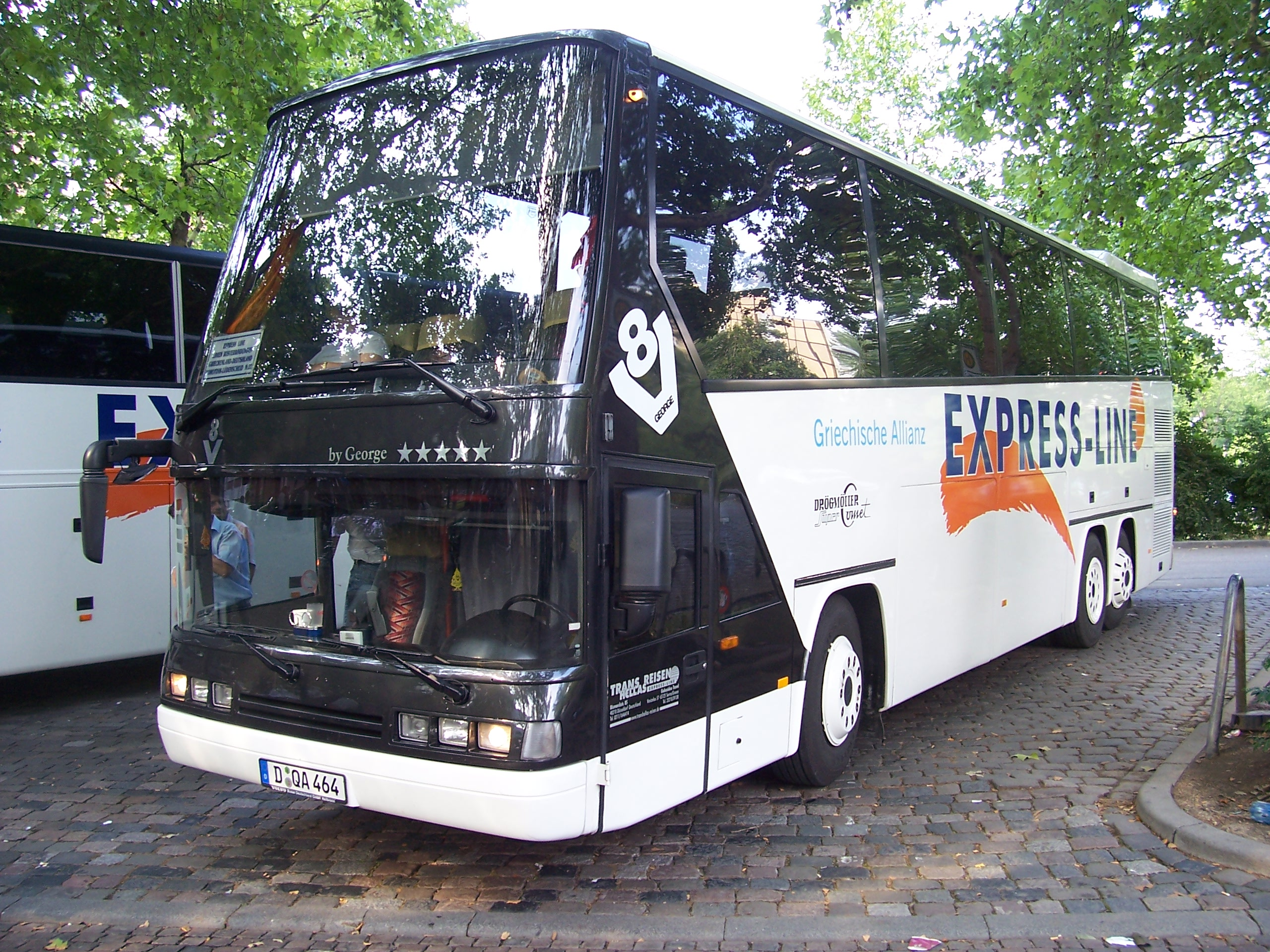 Ein Drögmöller Super Comet Reisebus in Mannheim.